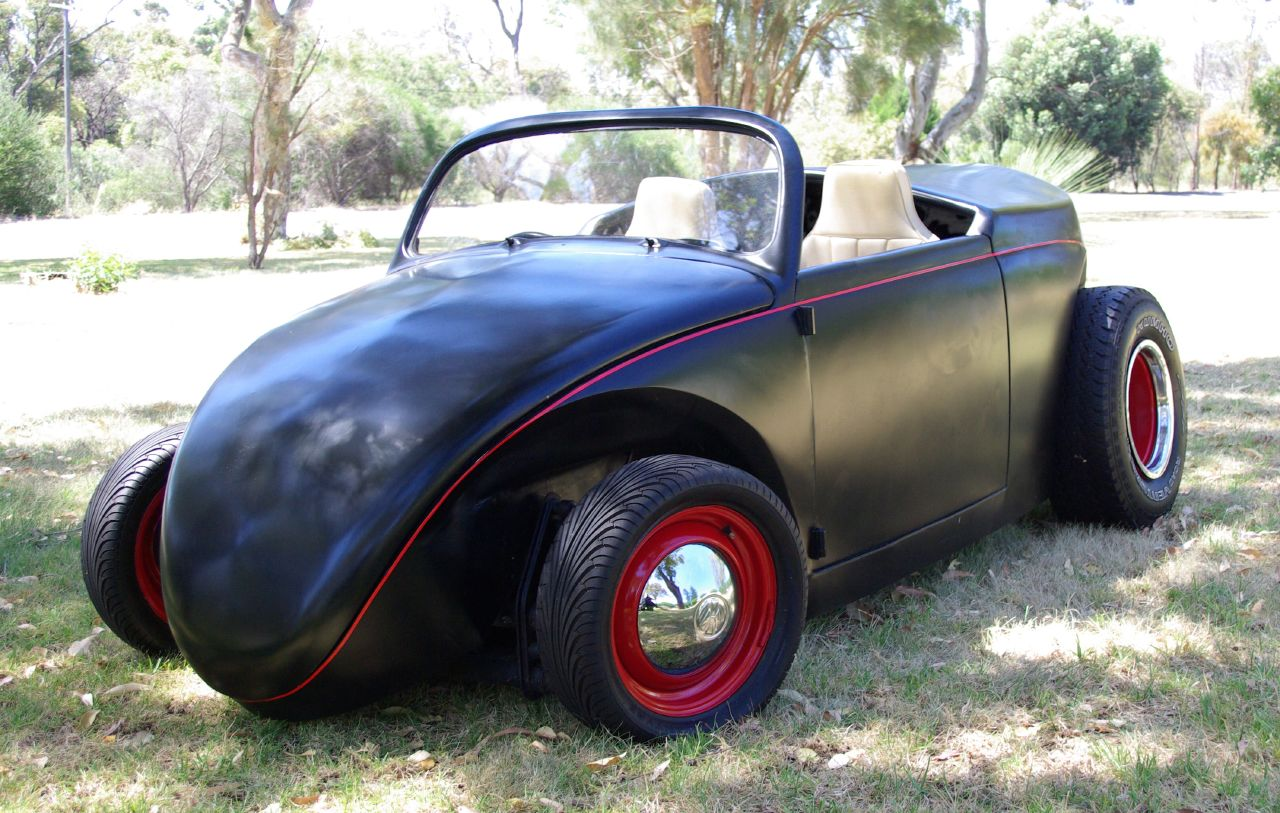 Volksrod